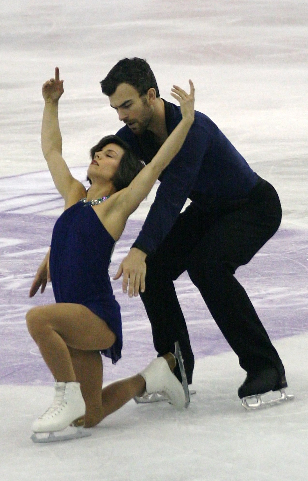 Мэган Дюамель и Эрик Рэдфорд (Канада) на финале Гран-при по фигурному катанию 2015-2016.